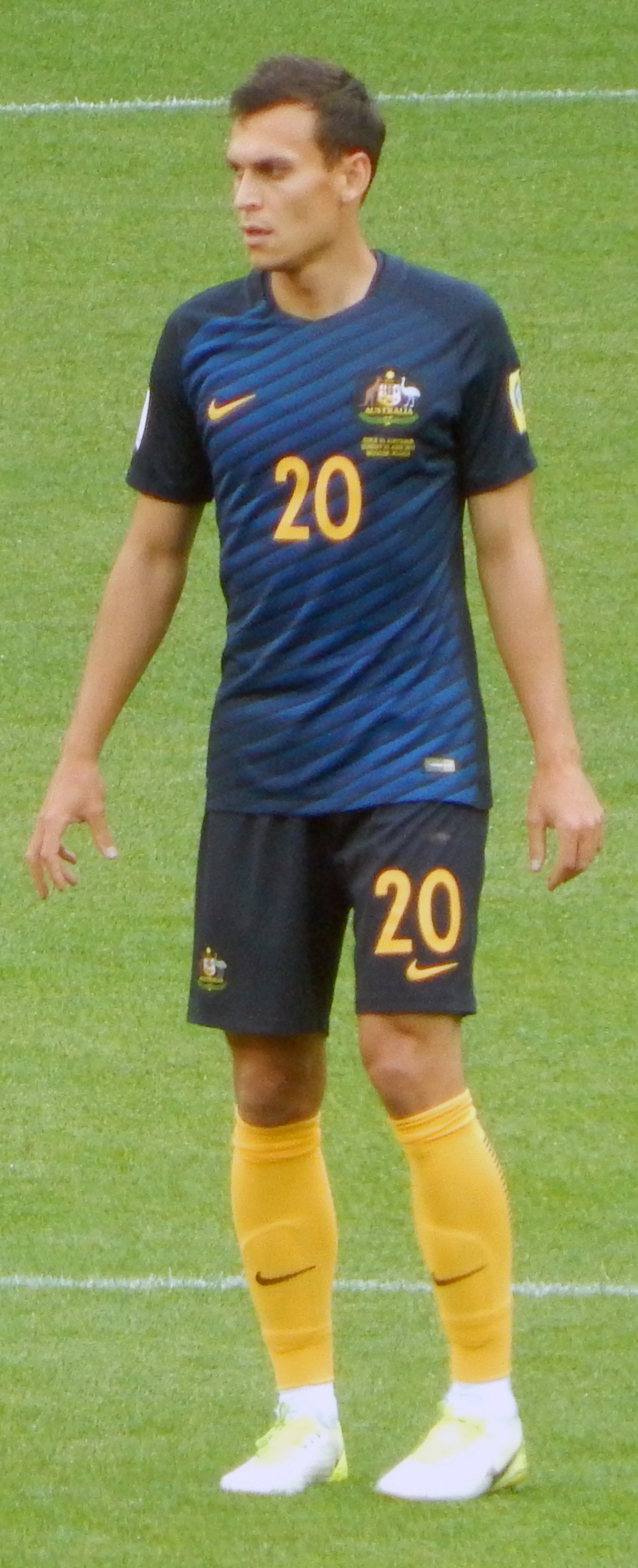 Трент Сайнсбери Матч Чили – Австралия